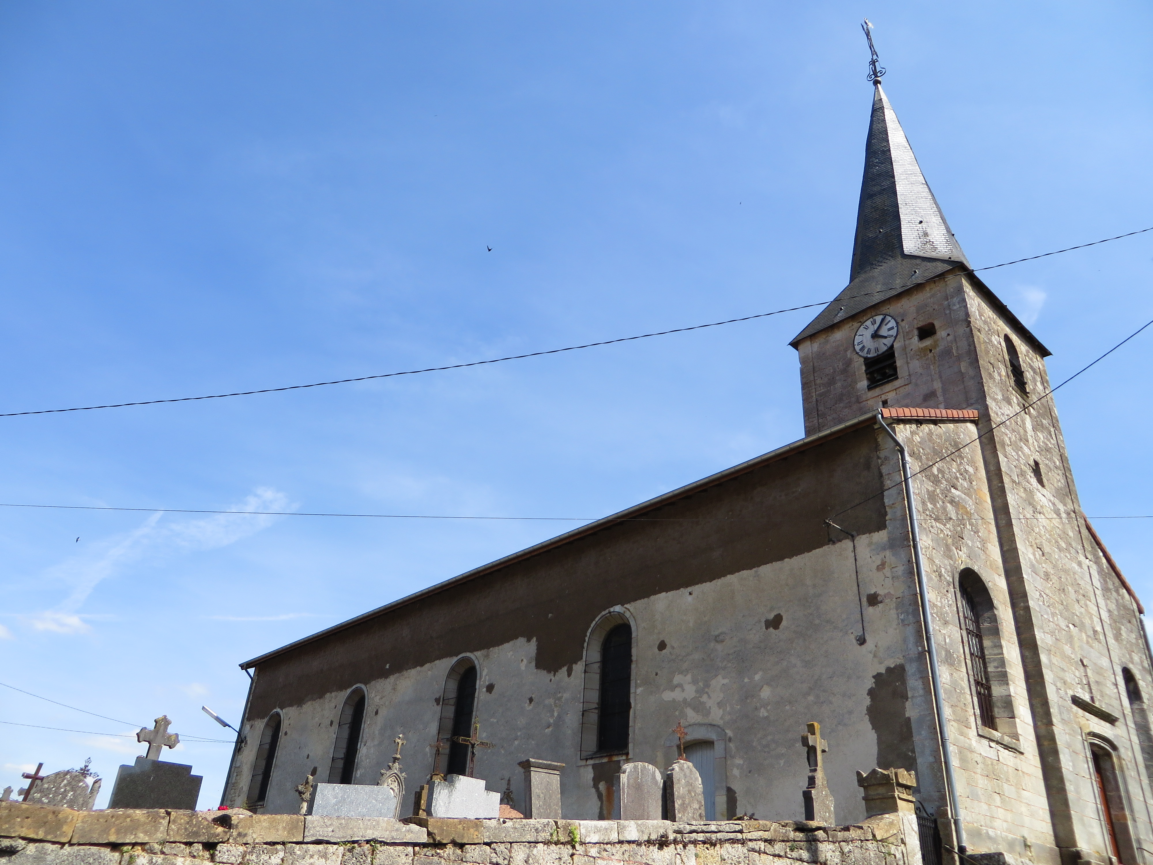 Bréhéville église Saint-Jean-Baptiste